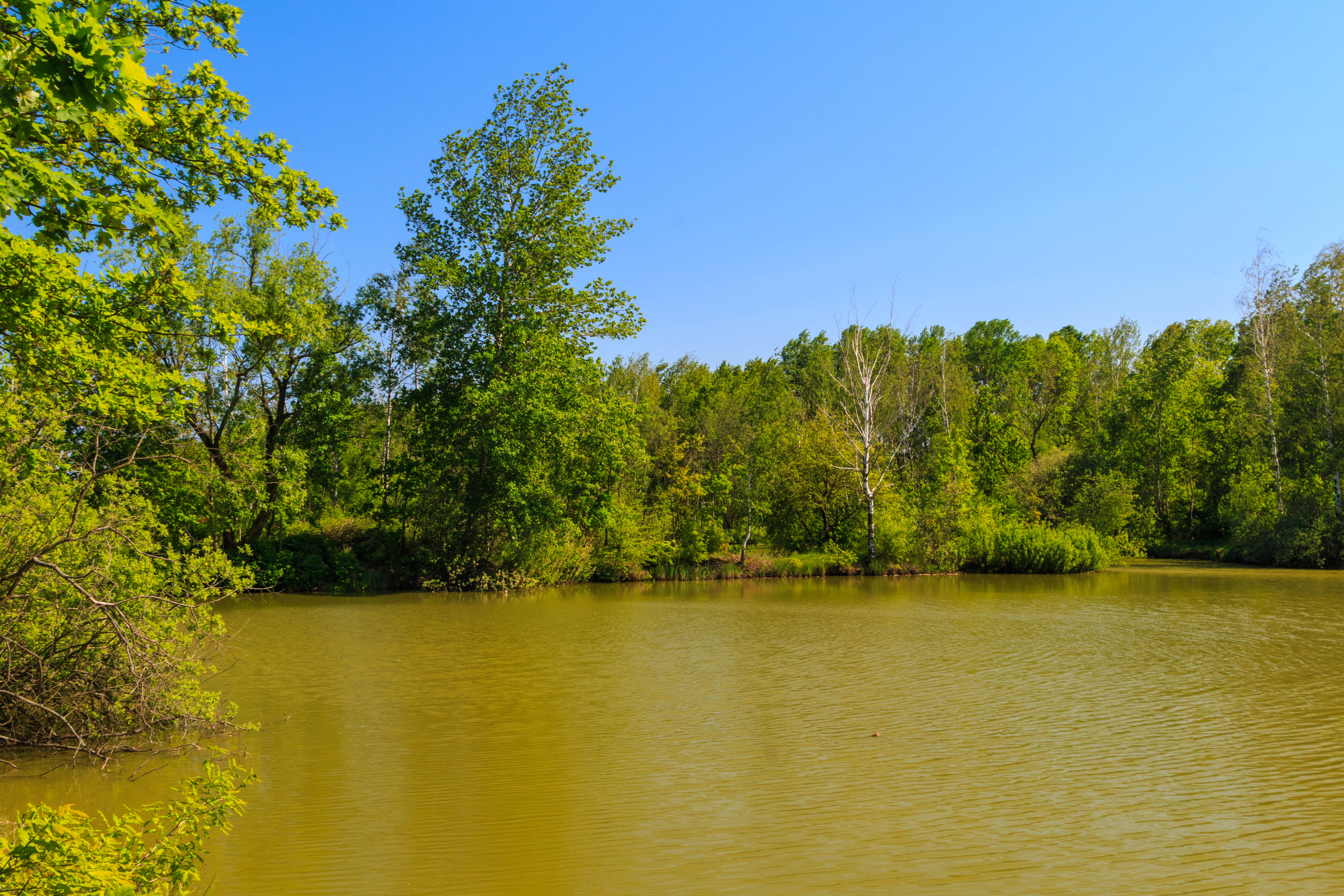 Komárovský písník Project: Vodstvo.